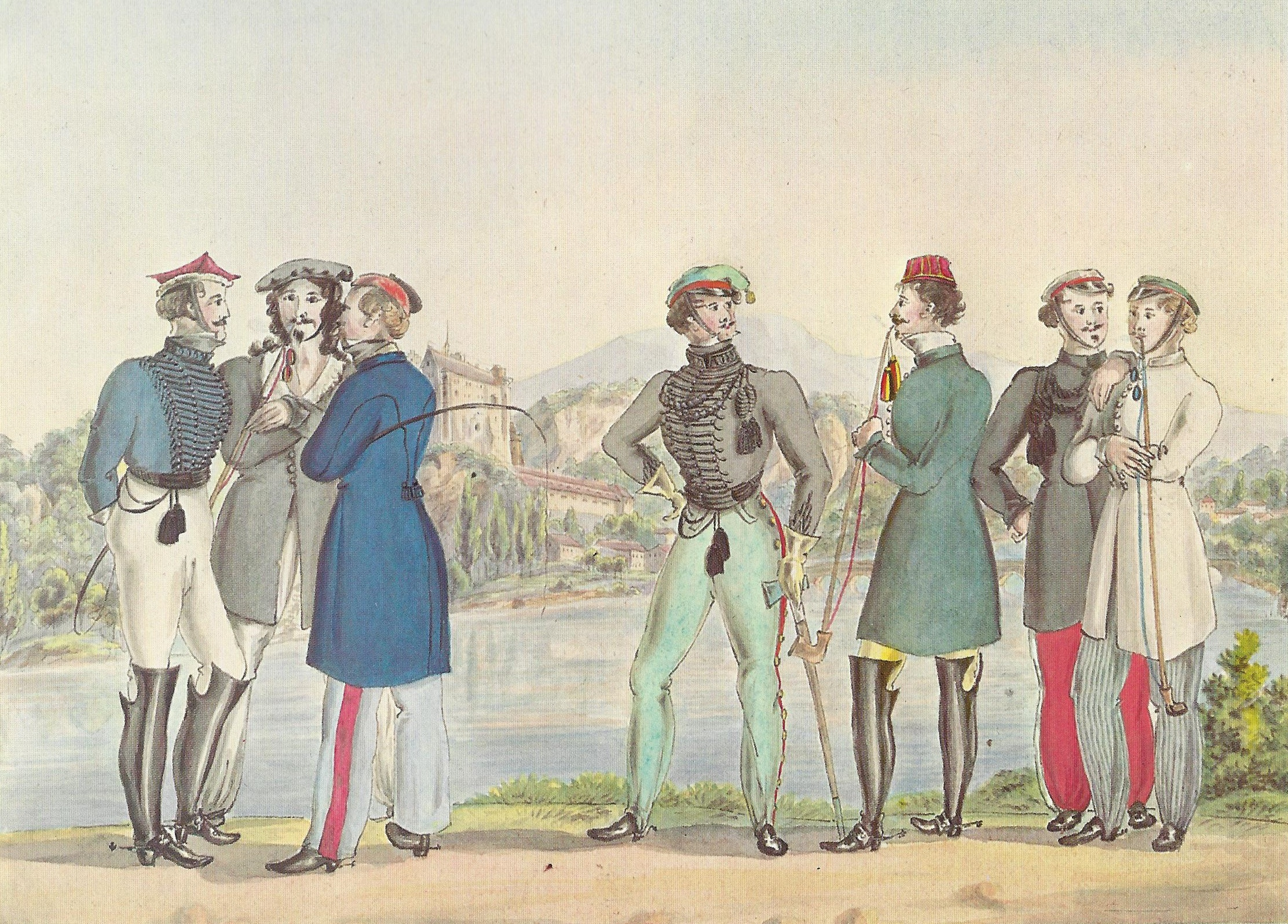 Würzburger Studententrachten des frühen 19. Jahrhunderts; Franken, Mainländer und Schweizer.